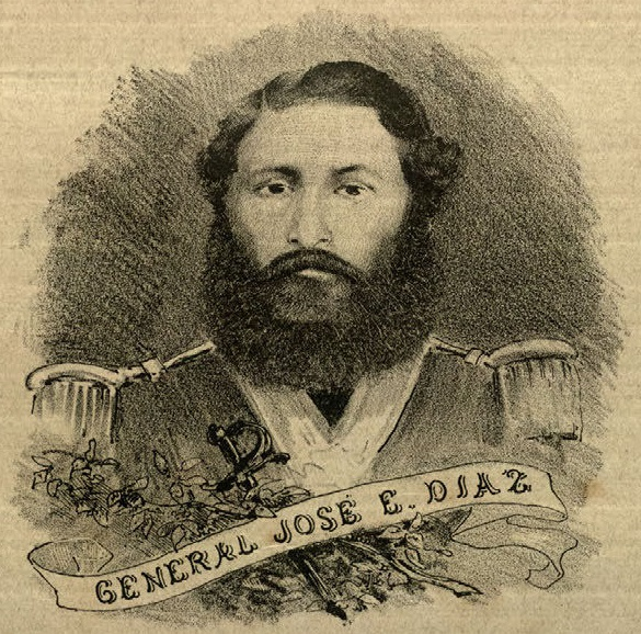 General José E. Diaz.